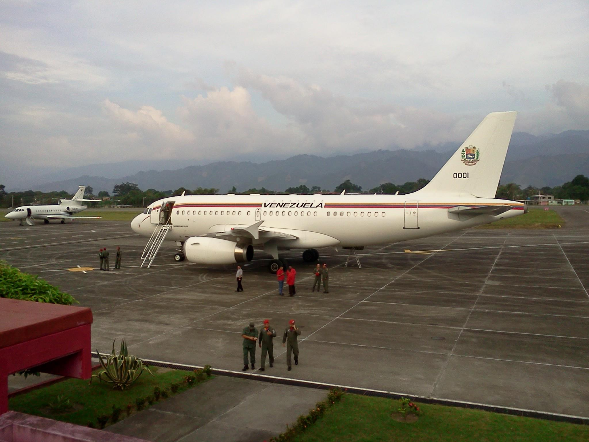 Airbus A319CJ Aeronave Presidencial de Venezuela en el Aeropuerto Antonio Nicolas Briceño